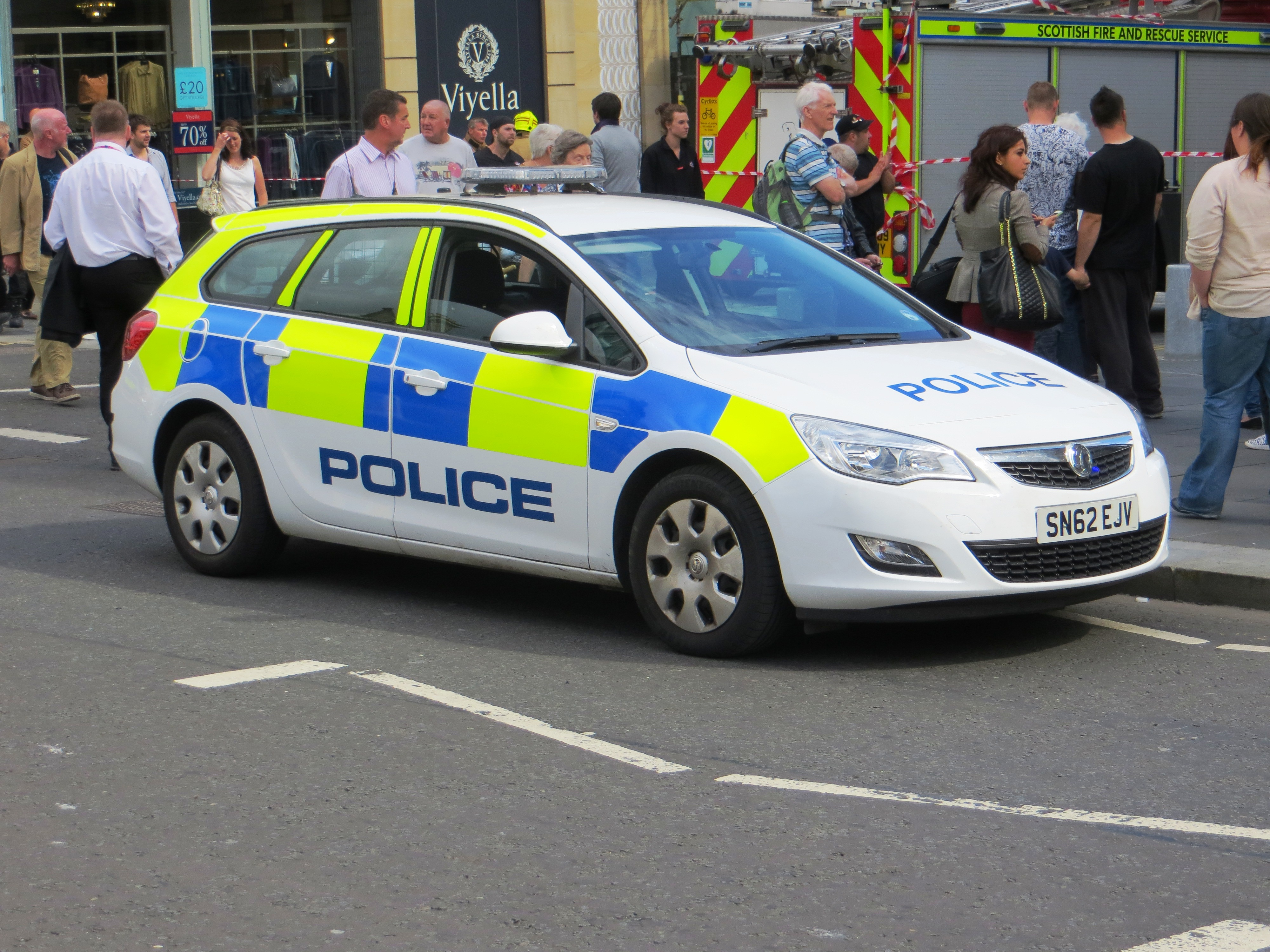 politieauto in Edinburgh